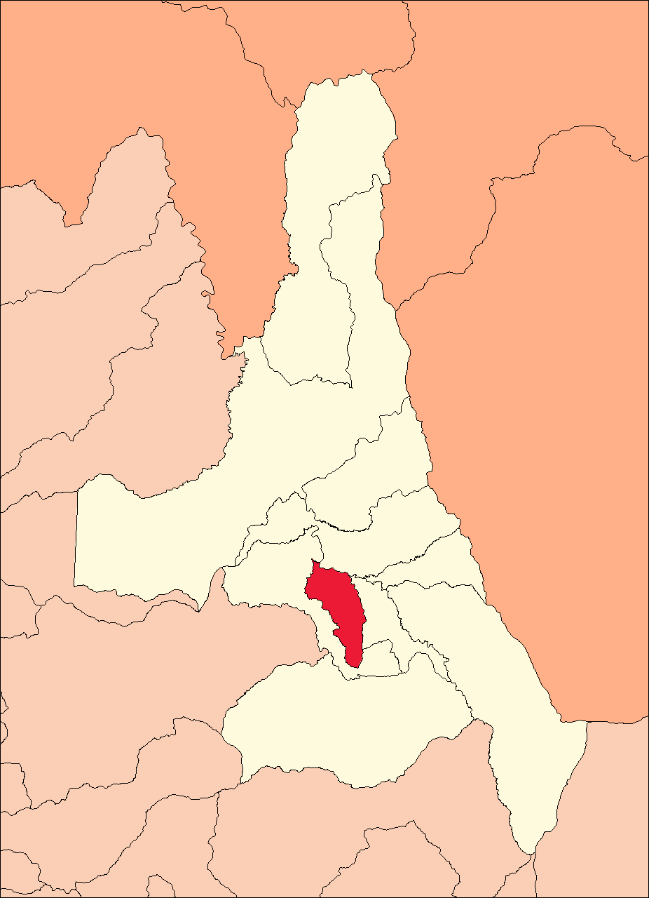 Área del distrito de Castillo Grande.